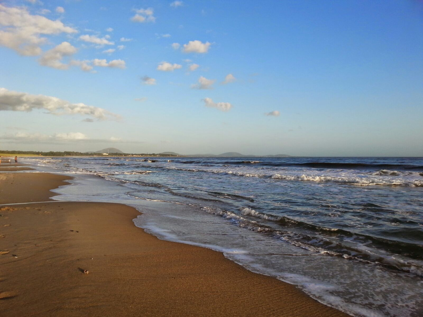 Playa de Jaureguiberry